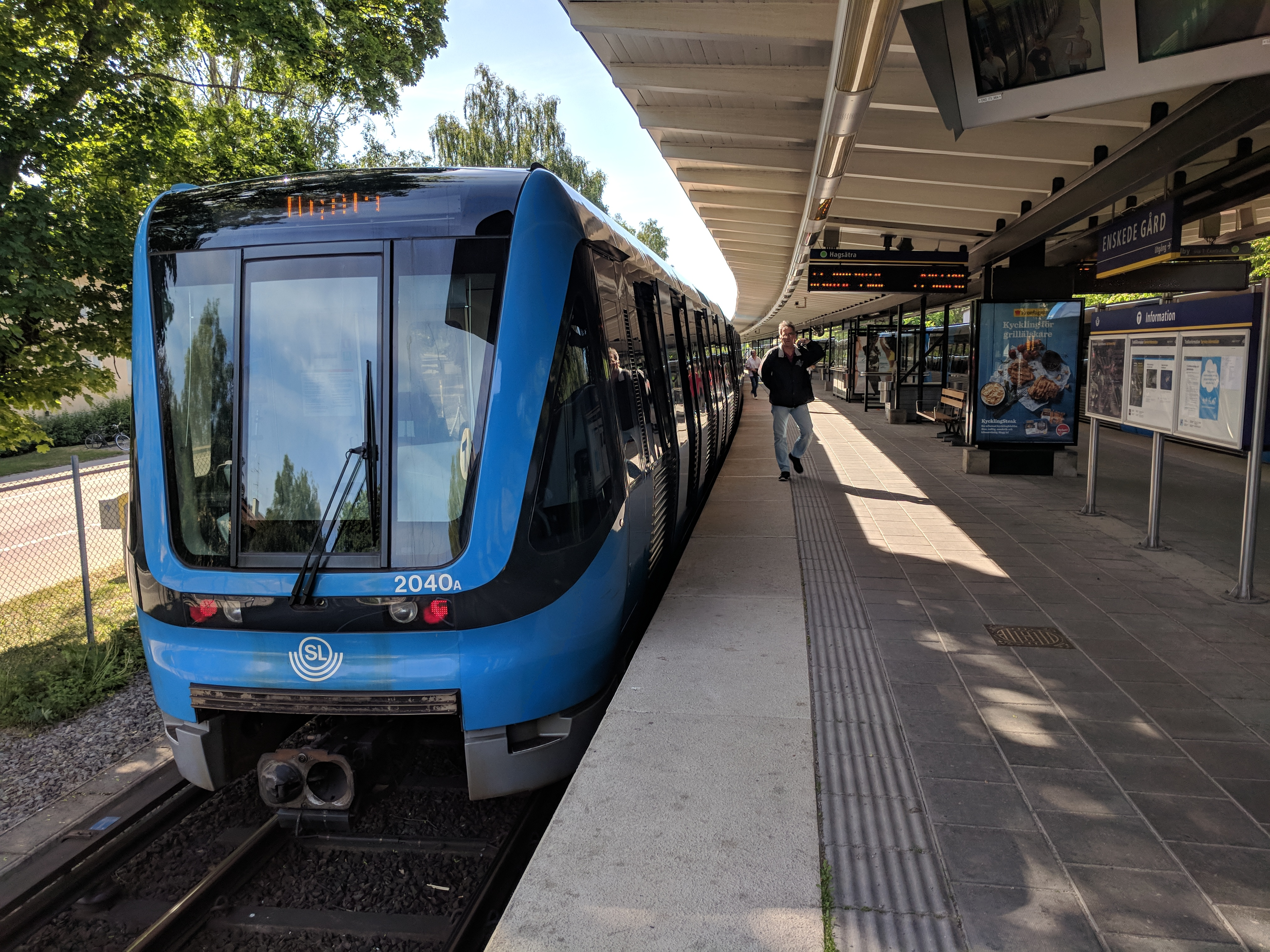 Enskede Gård metro